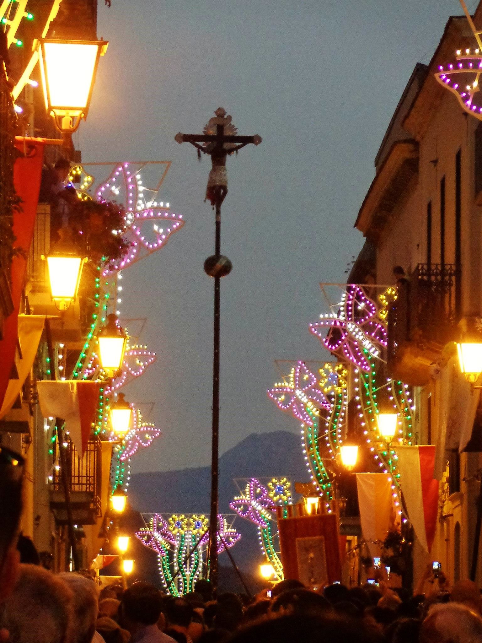 Fasi della processione (Foto SONY d'archivio personale, contestualmente presente nei profili personali (FB, Panoramio, Flickr, etc.))